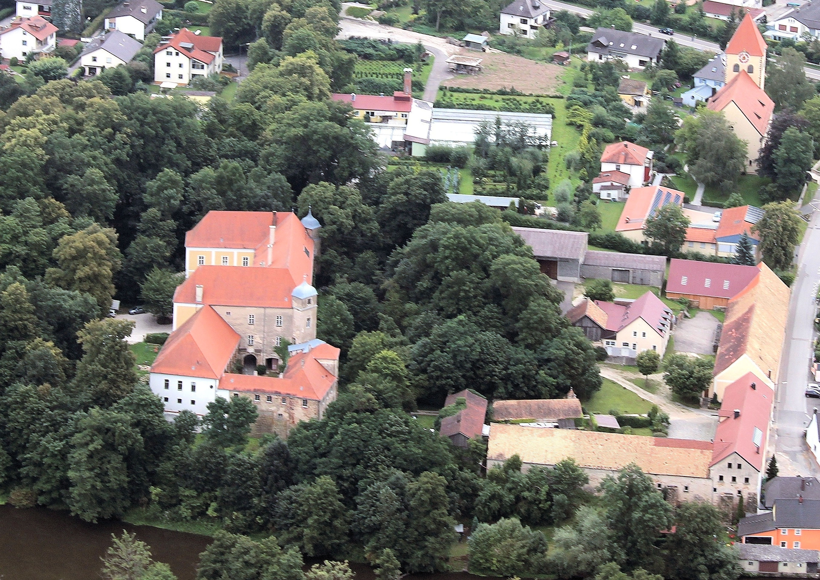 Schloss Fronberg; Fronberg, Stadt Schwandorf, Landkreis Schwandorf, Oberpfalz, Bayern